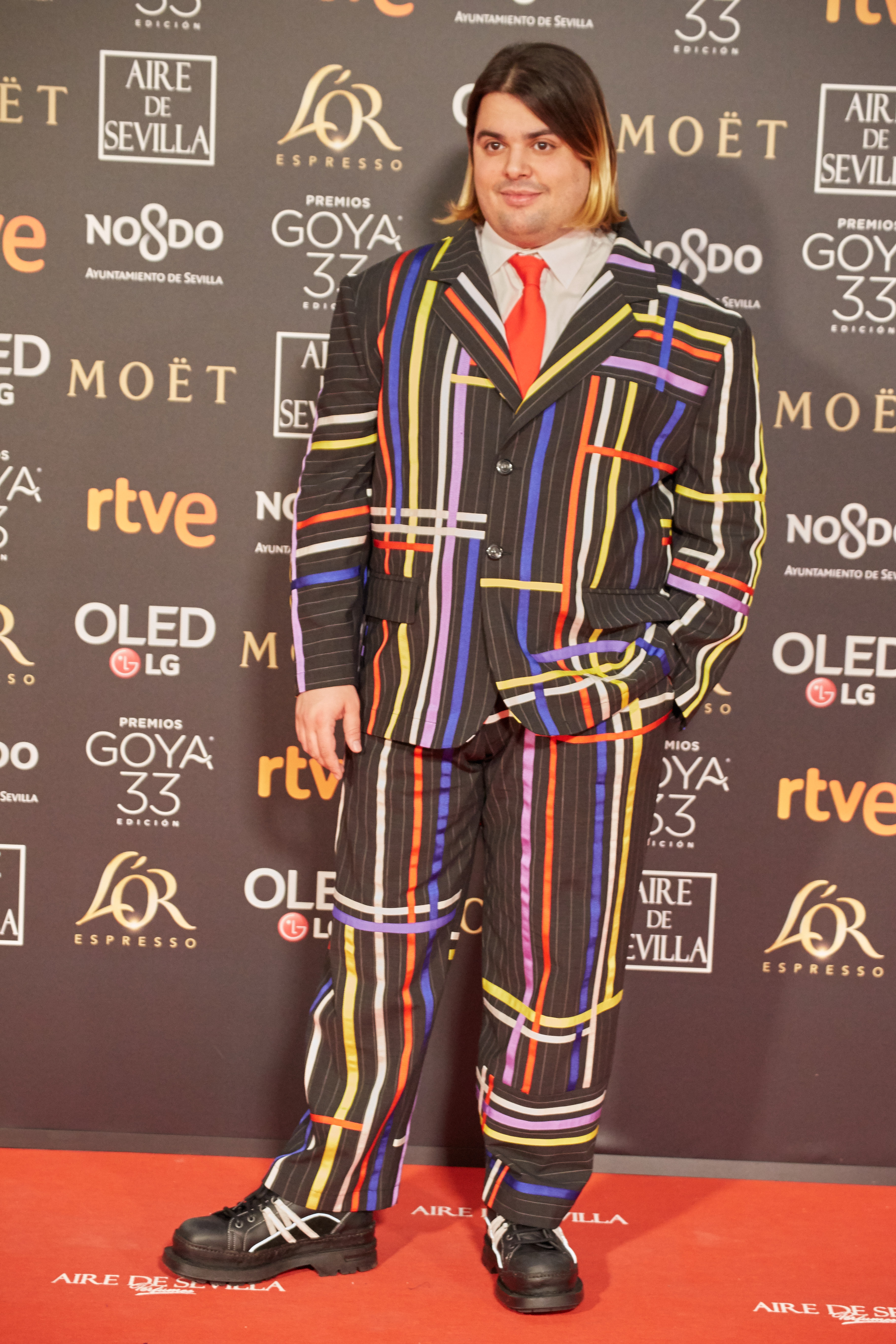 Brays Efe en la alfombra roja de los Premios Goya celebrados en Sevilla en Febrero 2019